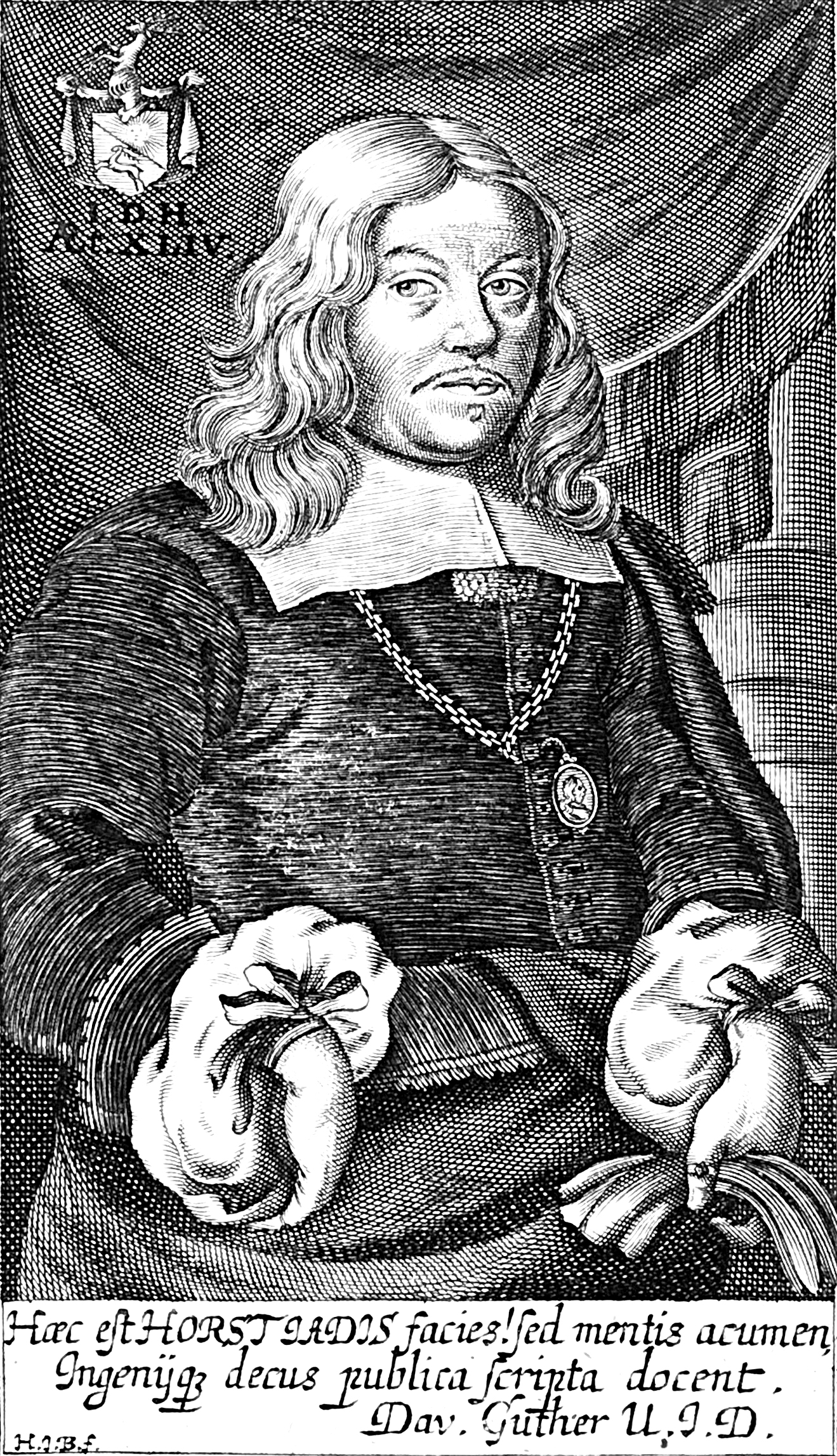 Portrait von Johann Daniel Horstius